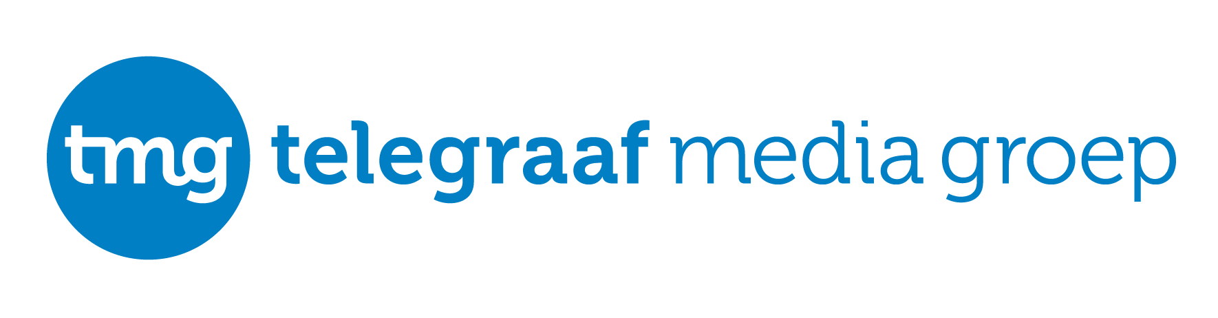 Telegraaf Media Groep TMG Logo